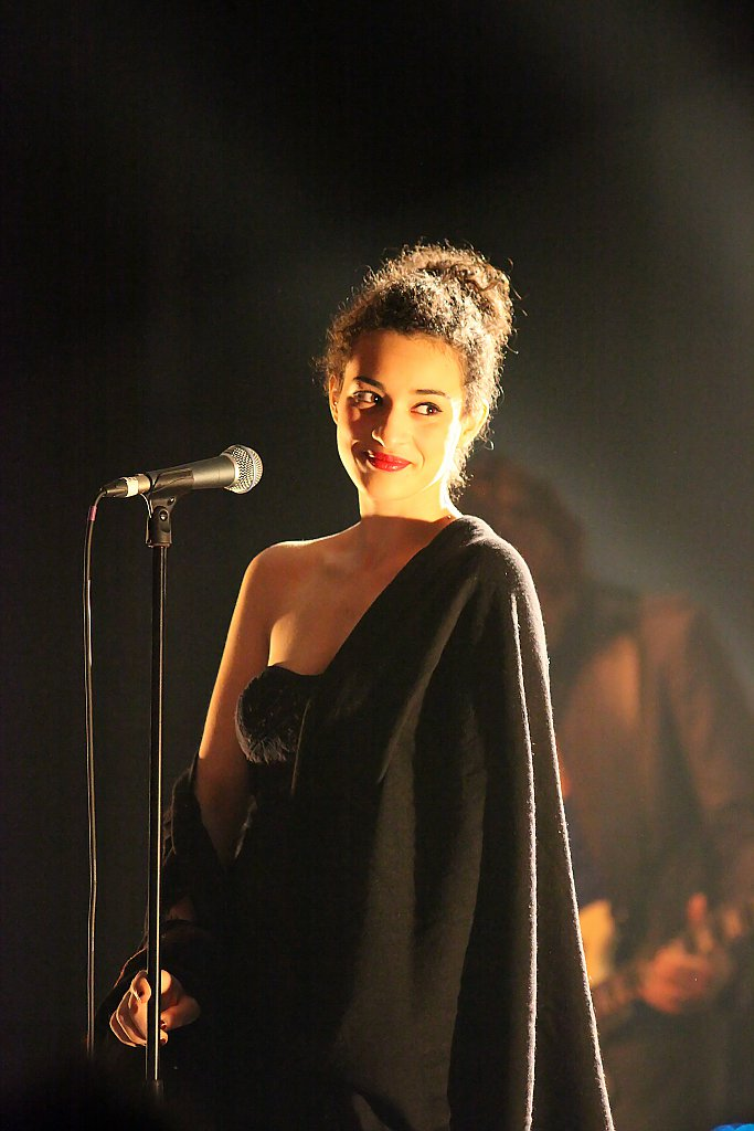 Camélia Jordana au cours de son concert à Morcenx, le 9 avril 2011